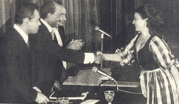 تكريم سعاد حسني من قبل الرئيس السادات في احتفالية عيد الفن عفي السبعينيات